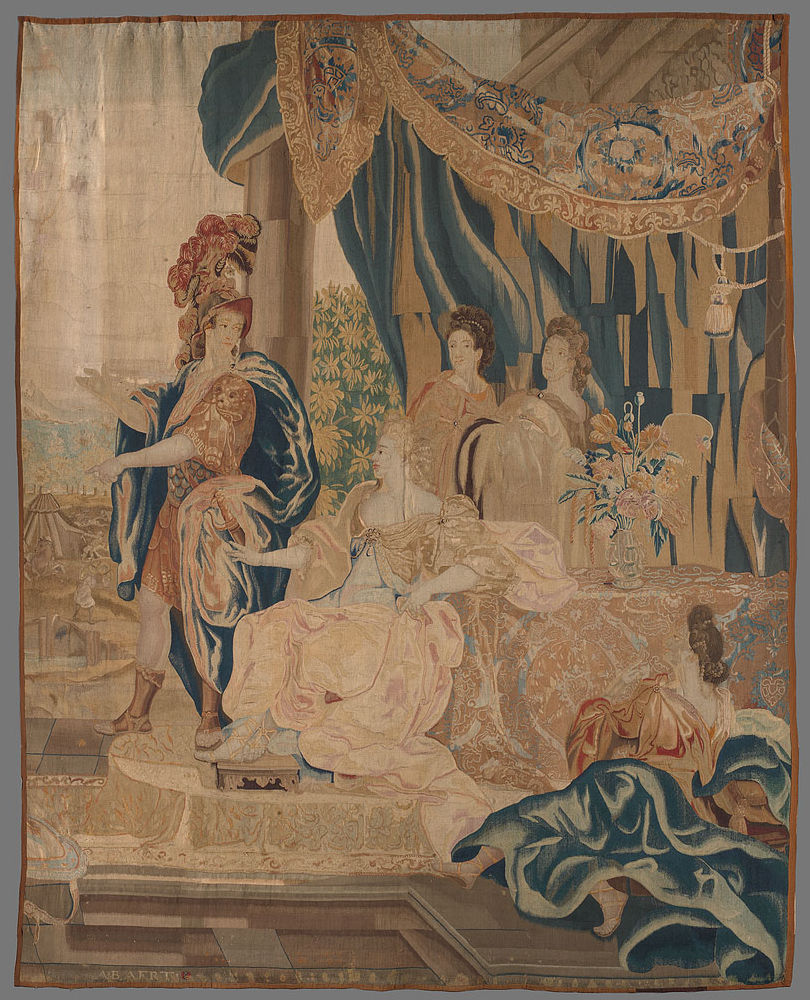 Wandtapijt Amadis en Orianne, weduwe Alexander Baert en Zonen, 1728